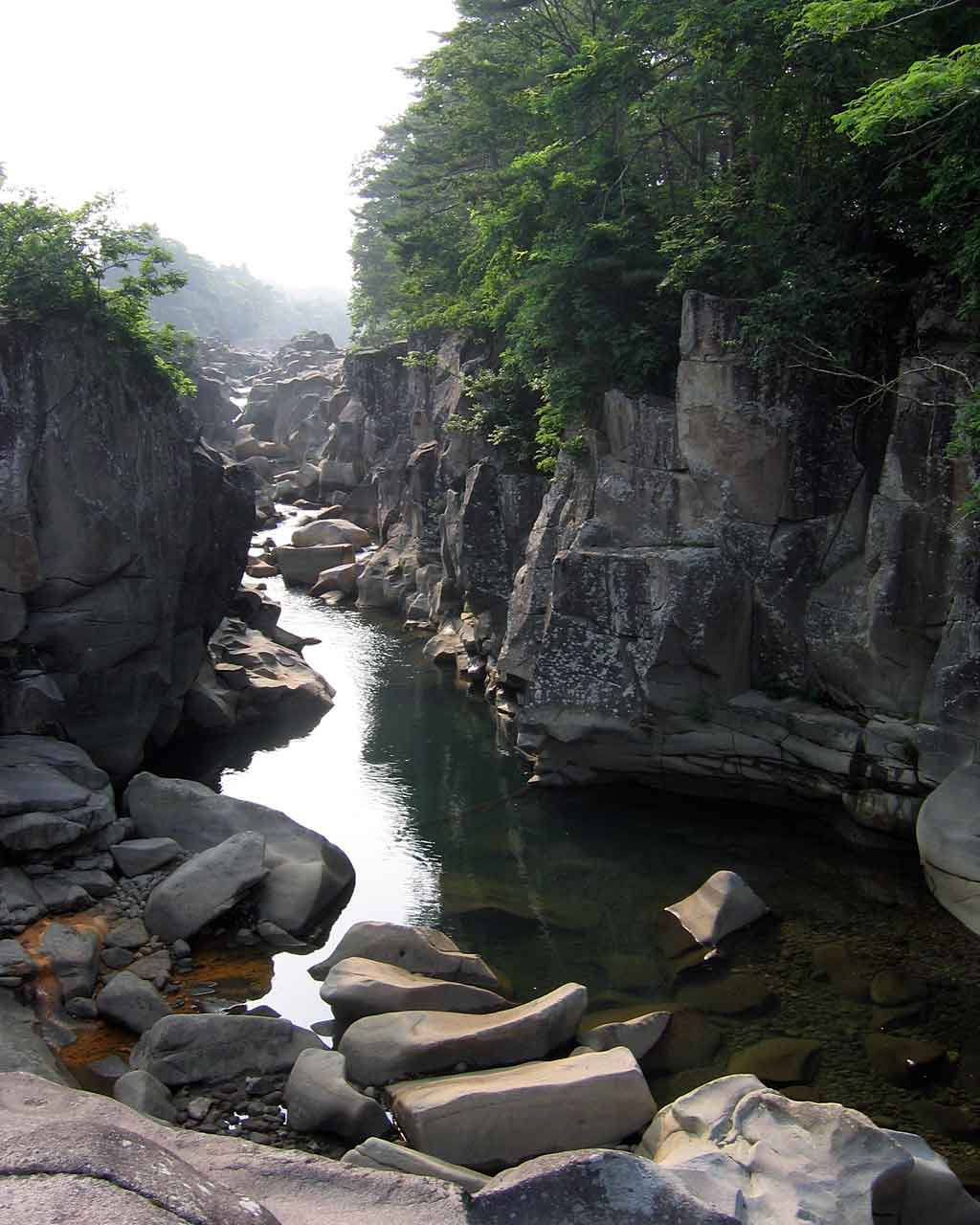 Geibikei Gorge in Iwate.